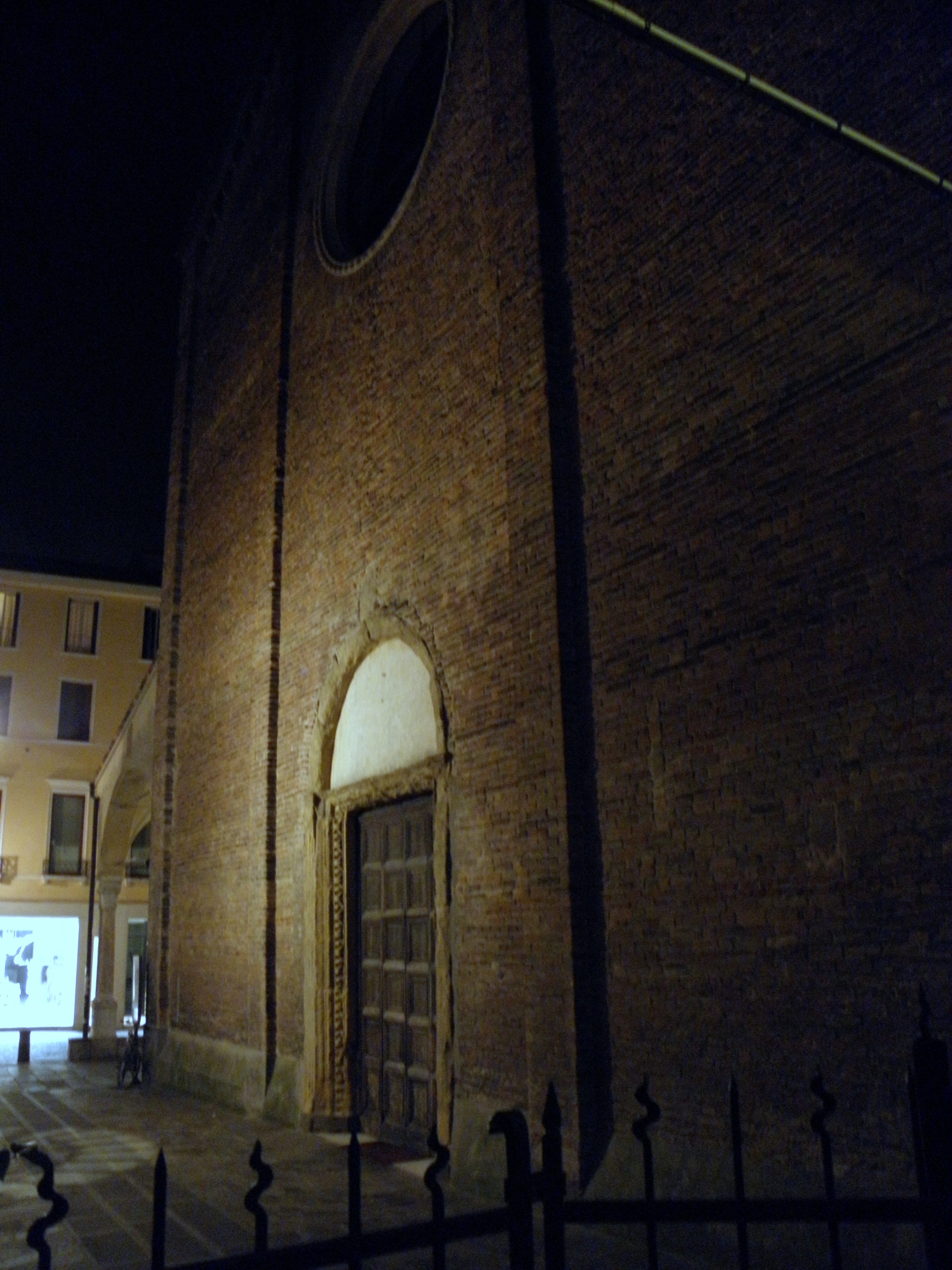 Padova, chiesa parrocchiale di Santa Maria dei Servi: vista notturna della facciata da Vicolo dei Servi.